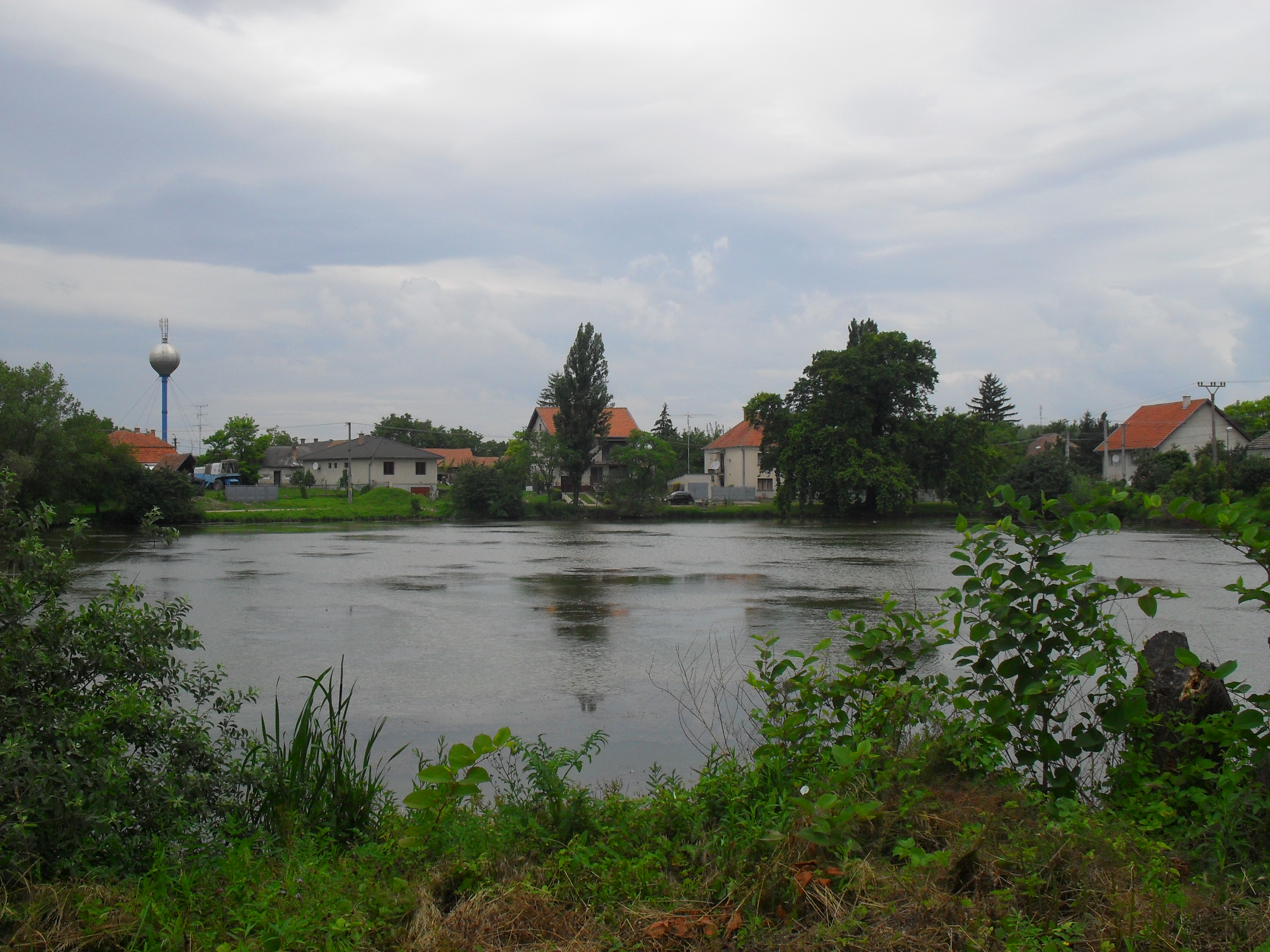 Martos